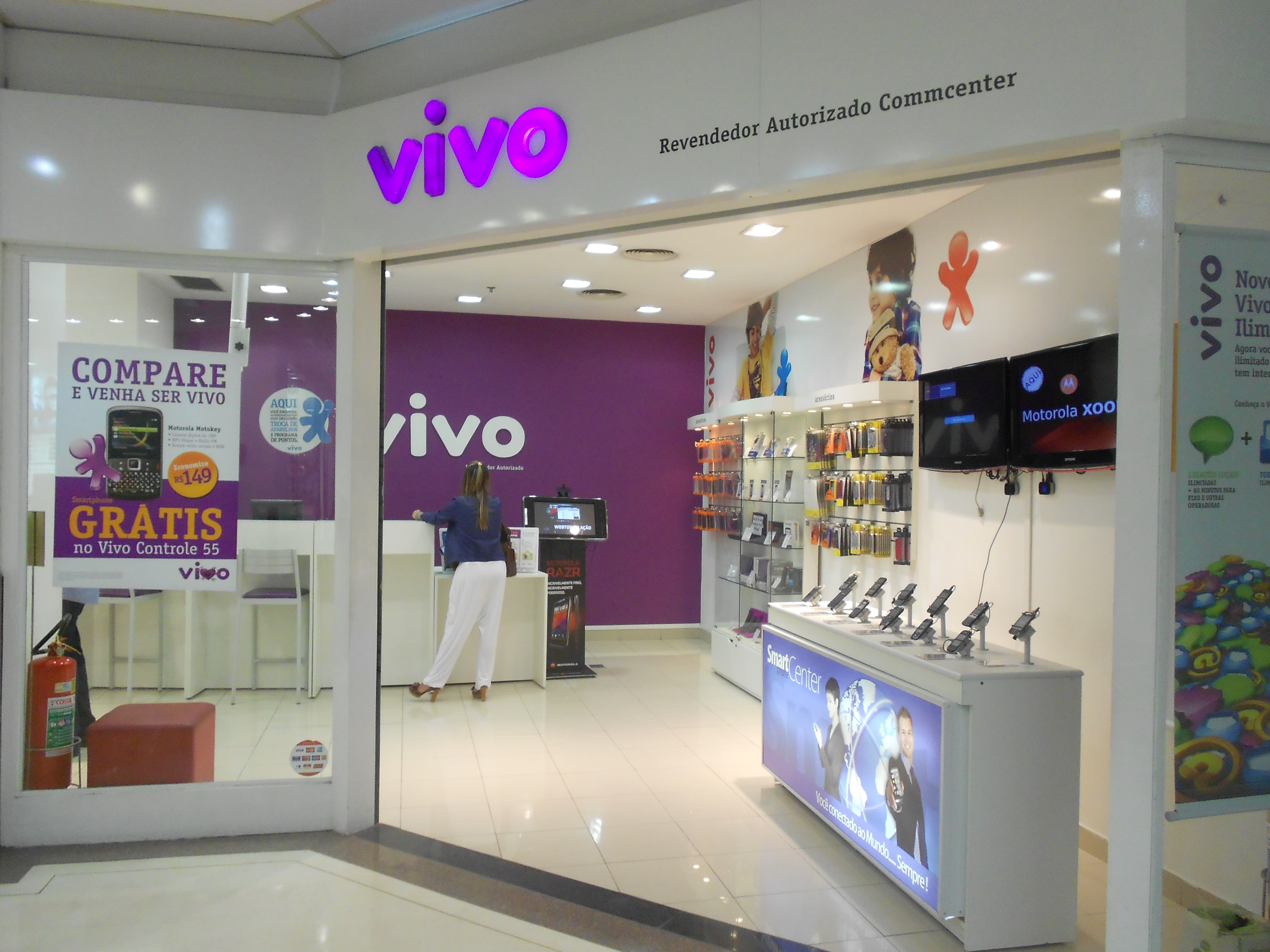 Filial da operadora Vivo, no Botafogo Praia Shopping, Botafogo, Rio de Janeiro, Brasil.